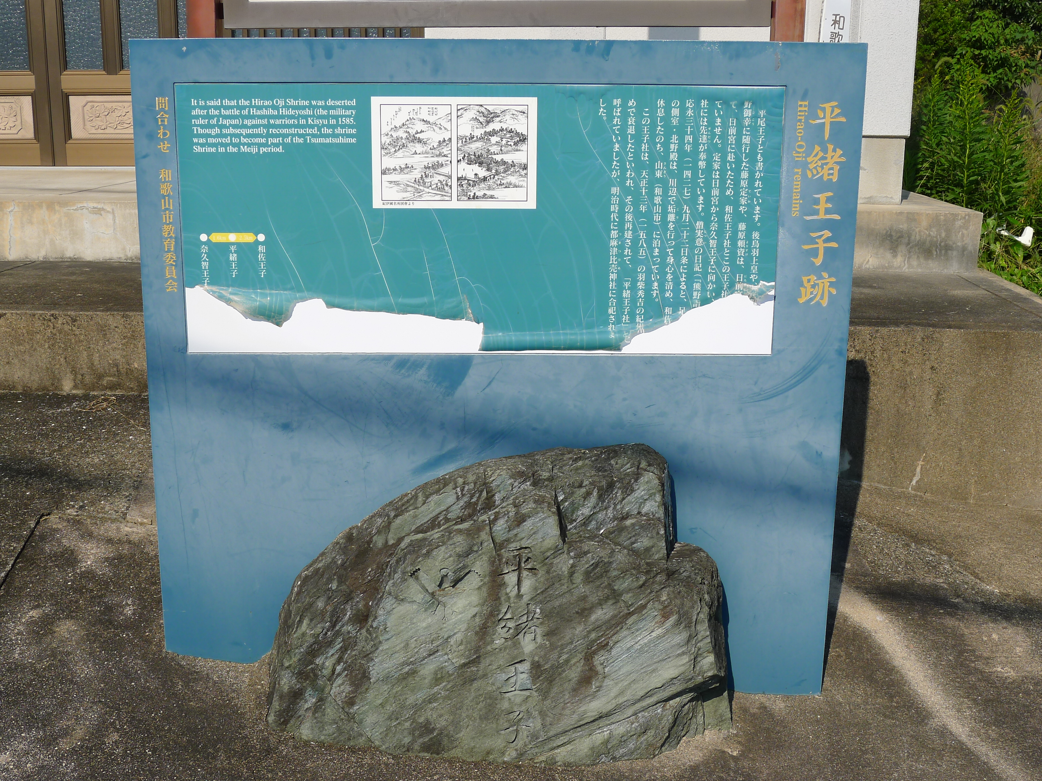 熊野古道・紀伊路の九十九王子の一つ平緒王子（和歌山県和歌山市）